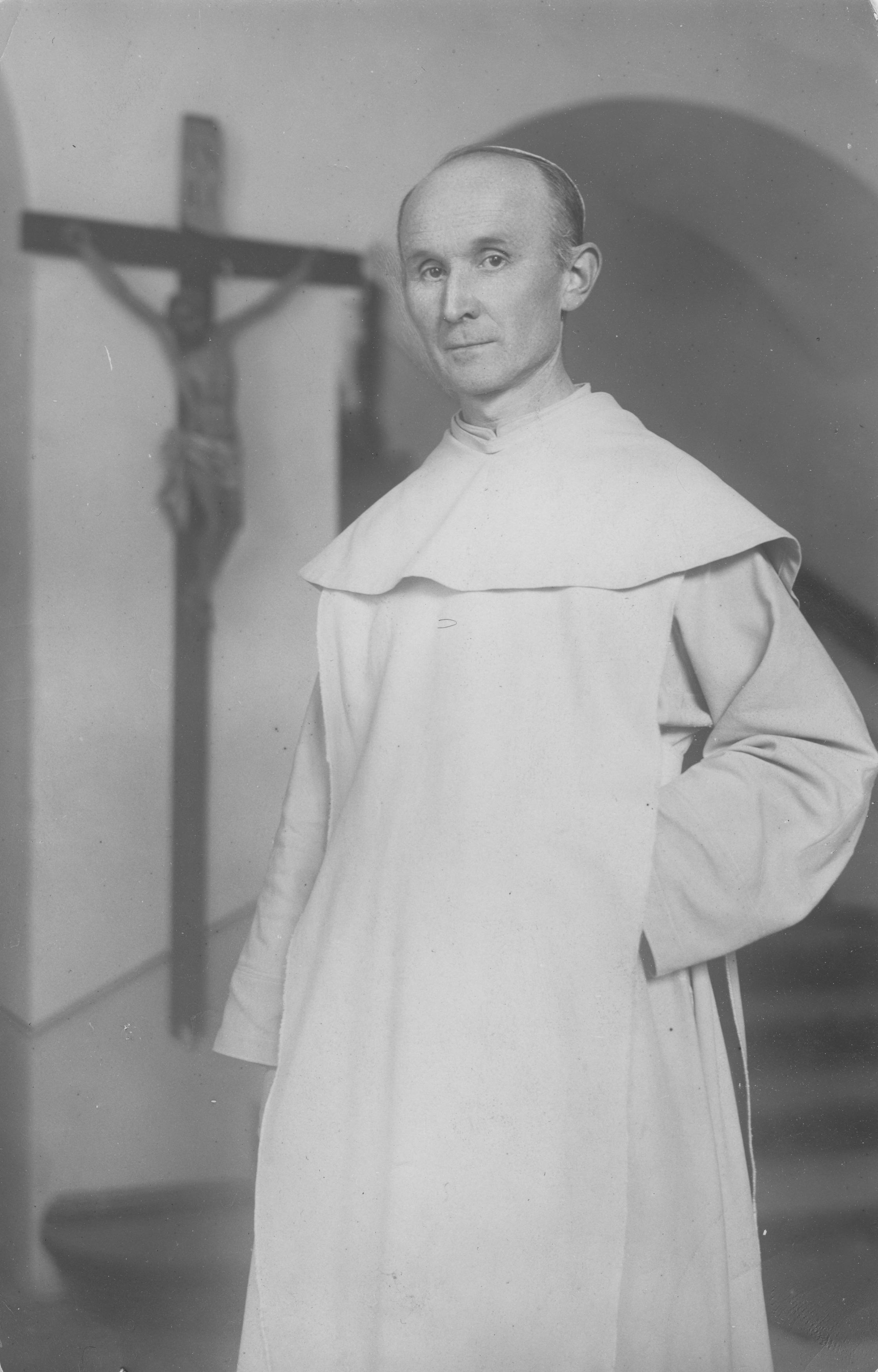 O. Piotr Markiewicz - przeor klasztoru OO. Paulinów na Jasnej Górze